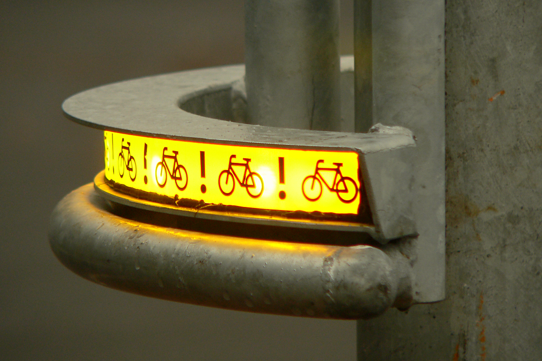 Bike-Flash Garbsen Burgstraße